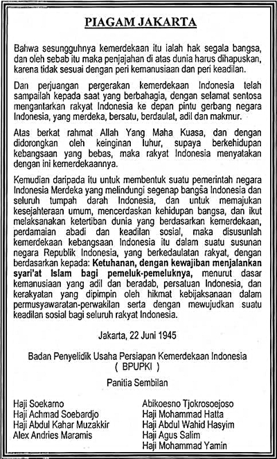 Naskah Asli "Piagam Jakarta" atau "Jakarta Charter"